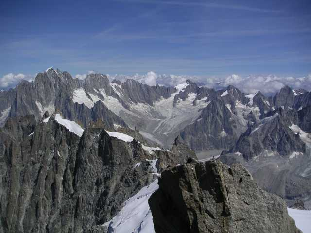 Alpy, widok z Aiguille du Midi